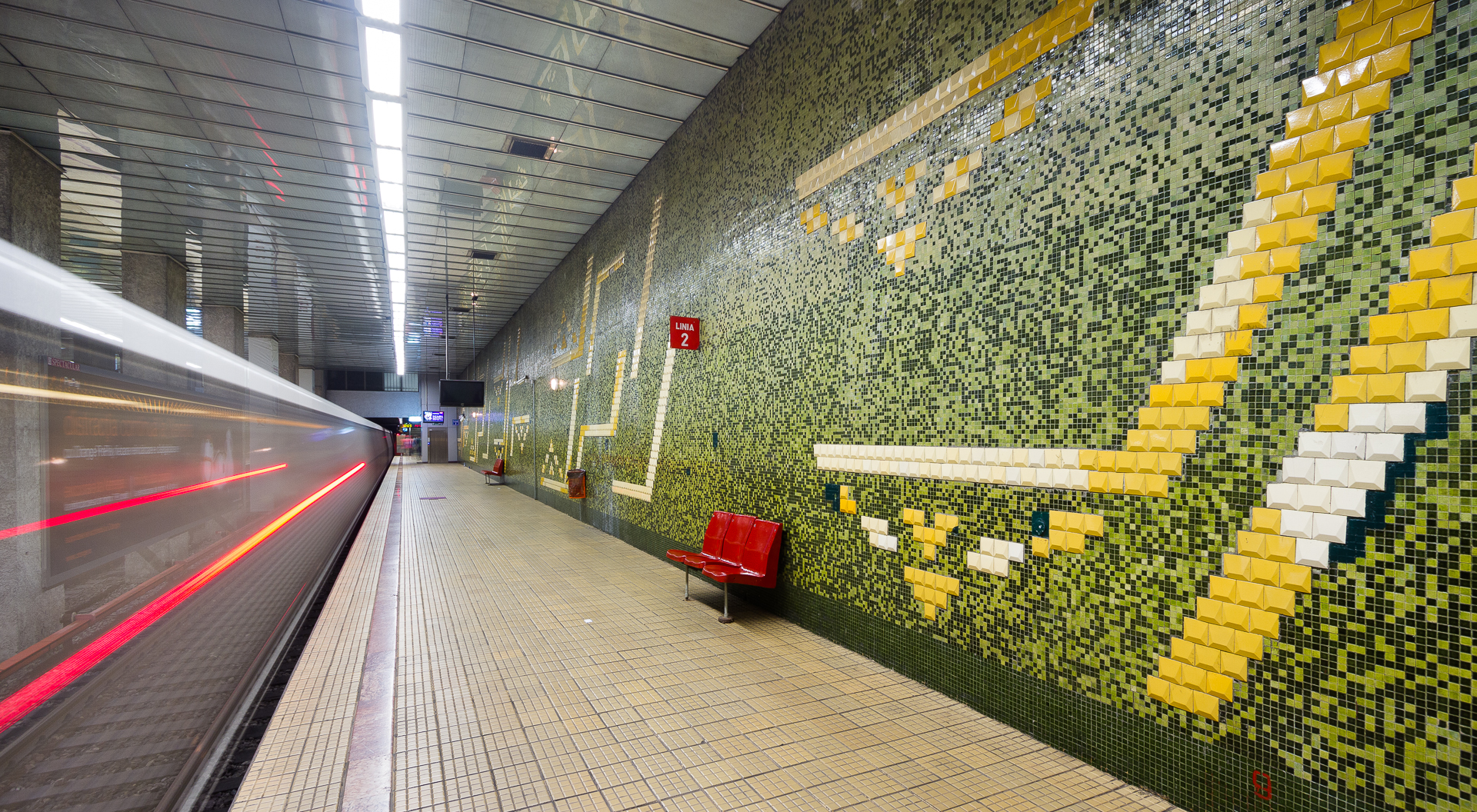 Statie Metrou - Grozavesti, Bucuresti